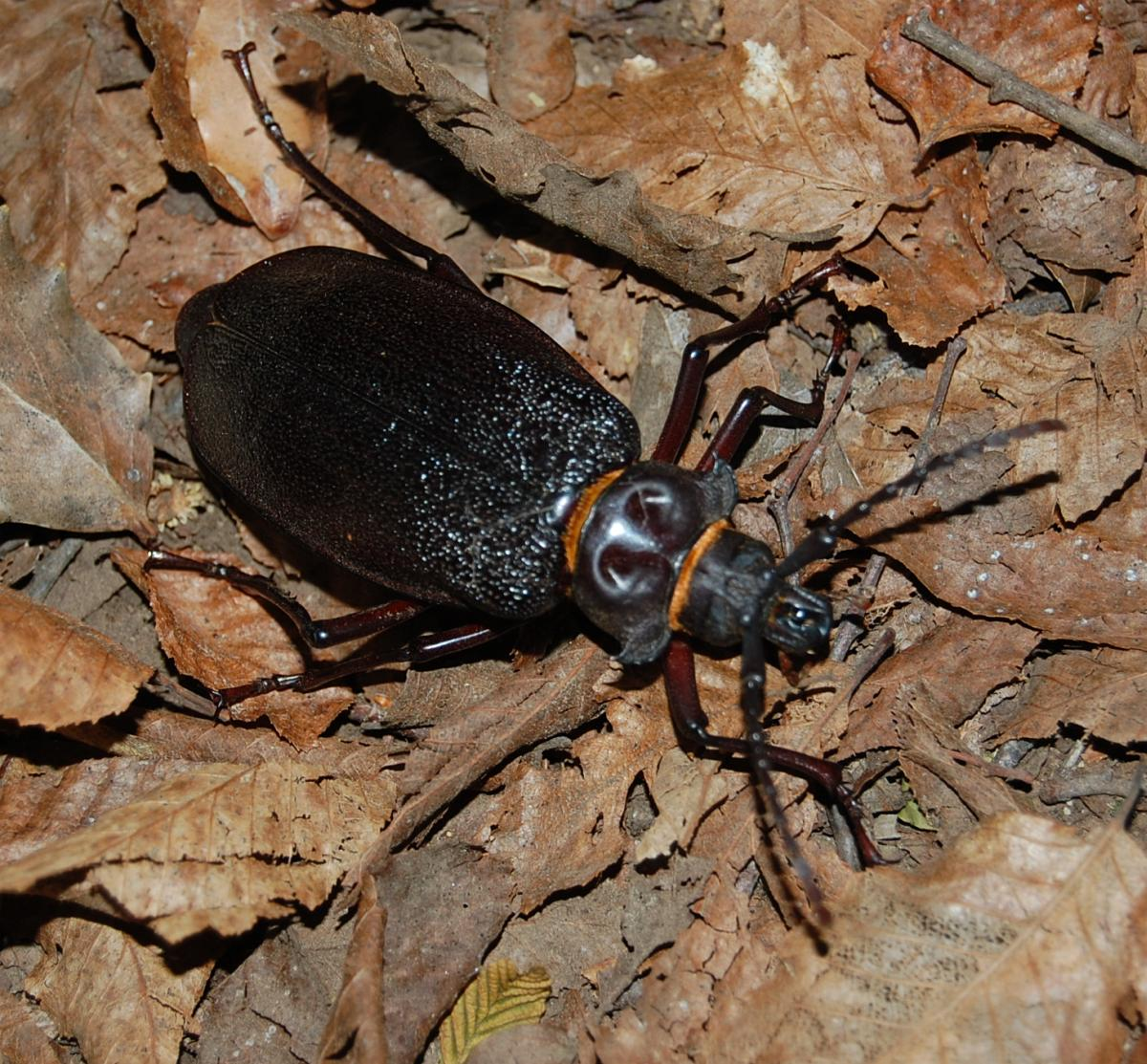 Madre de la Culebra, Acanthinodera cummingi en Radal Siete Tazas, Región del Maule, Chile.